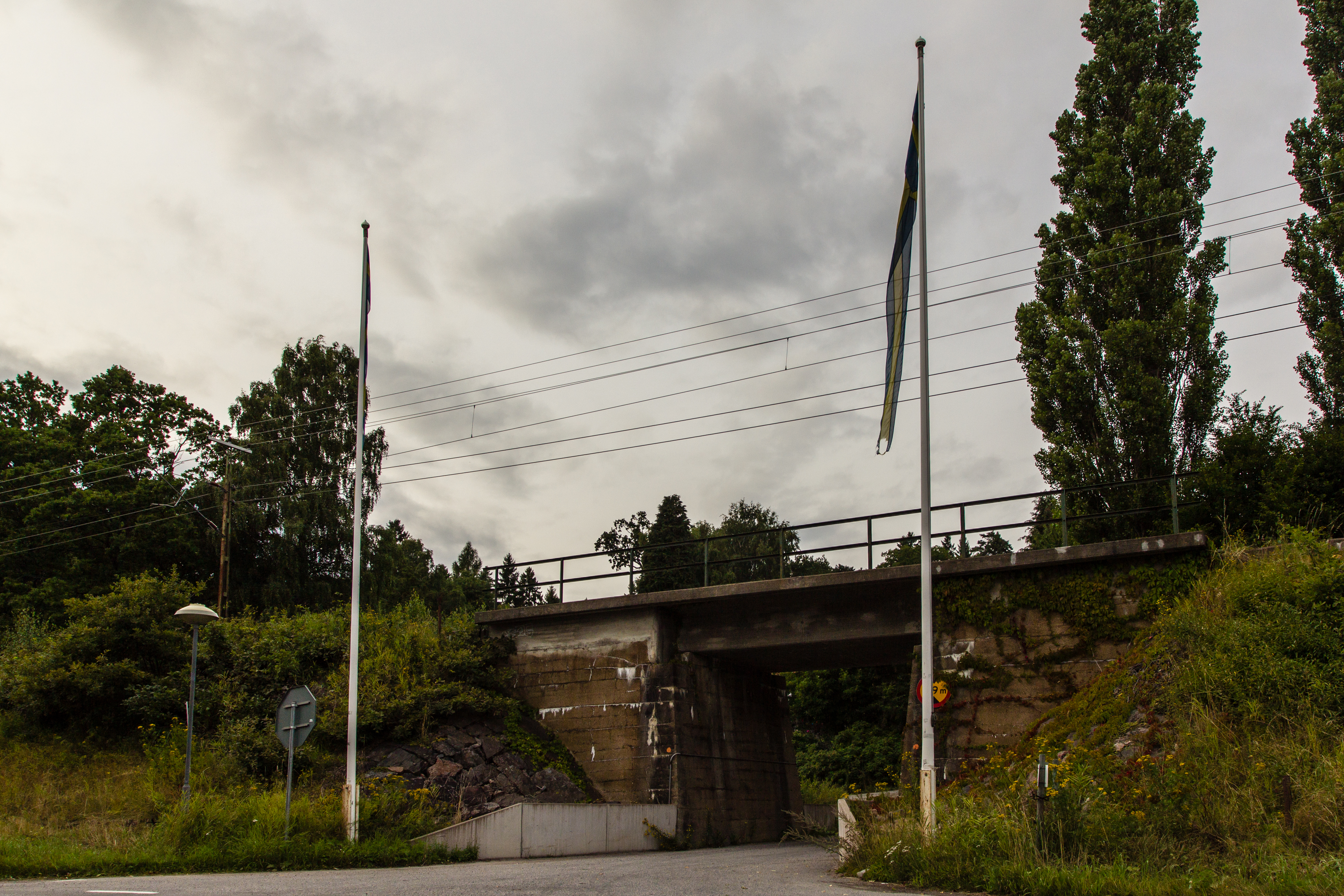 Järnvägundergång längs järnvägssträckningen Nyköping–Norrköping vid Getå Turisthotell, Norrköpings kommun, Östergötlands län.